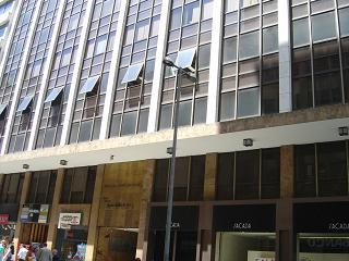 Fachada do Prédio da Chemtech